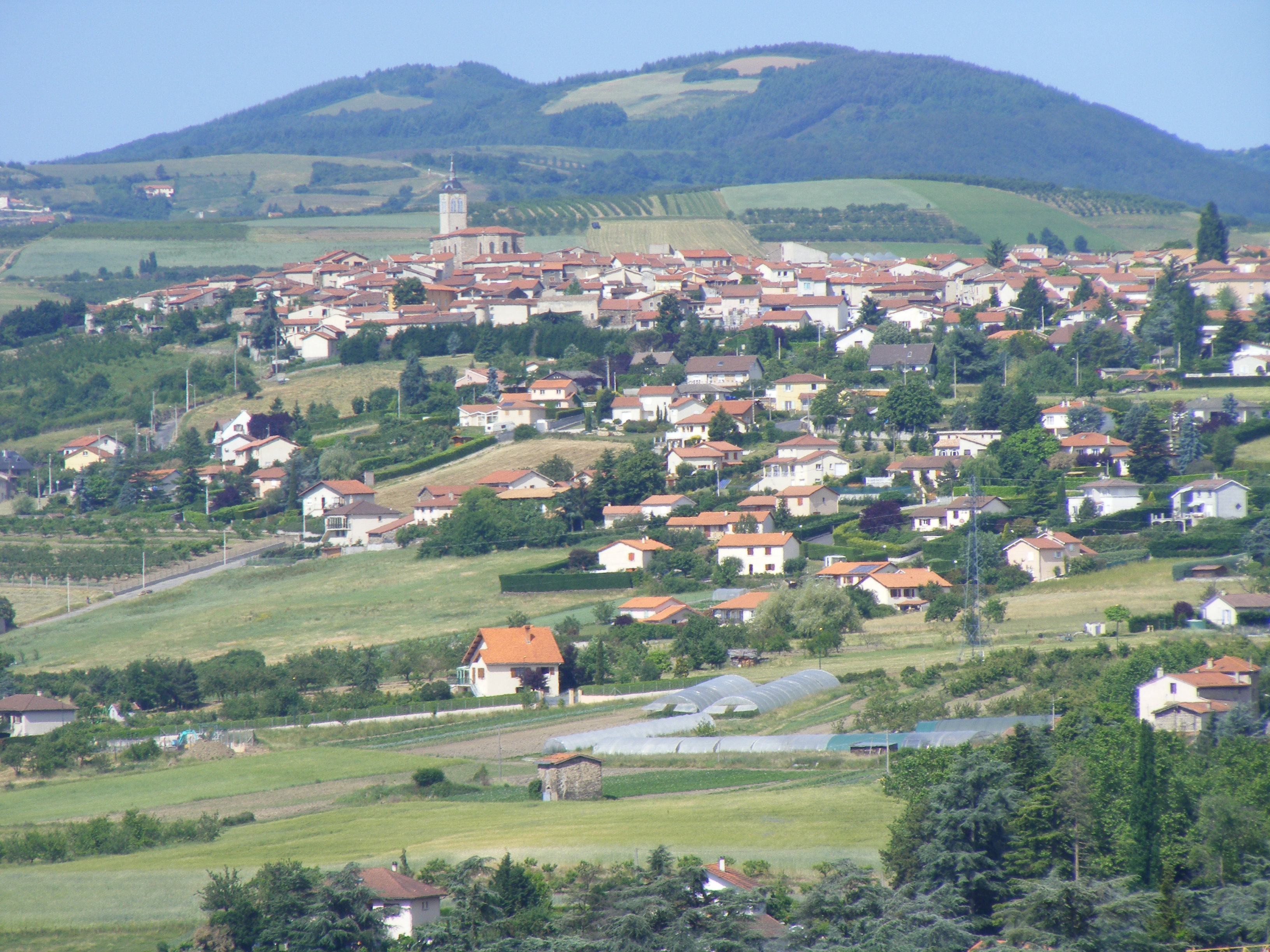 Vue générale de la commune de Génilac